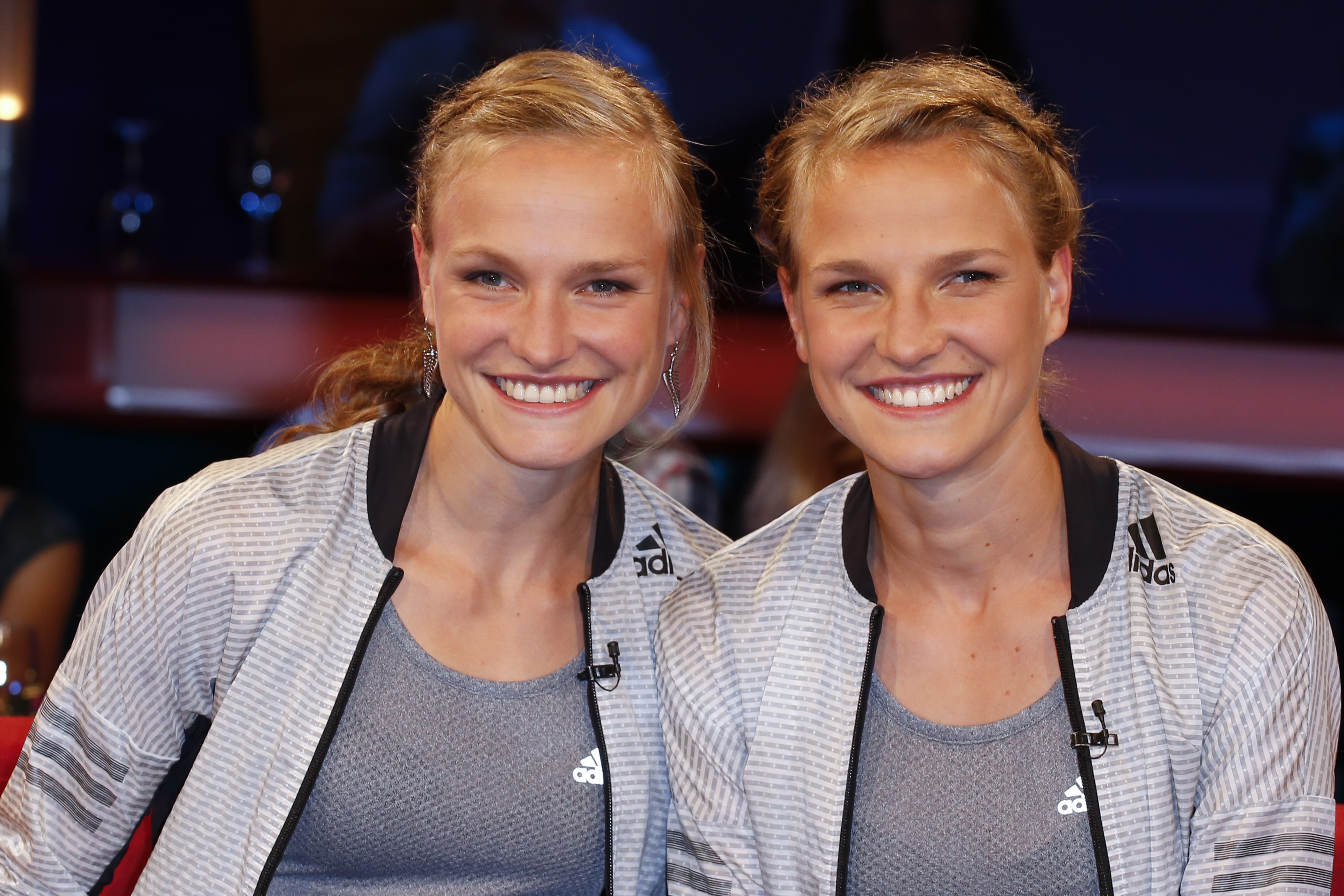 Anna und Lisa Hahner bei der NDR Talk Show am 03.06.2016 Foto; Jan-Timo Schaube